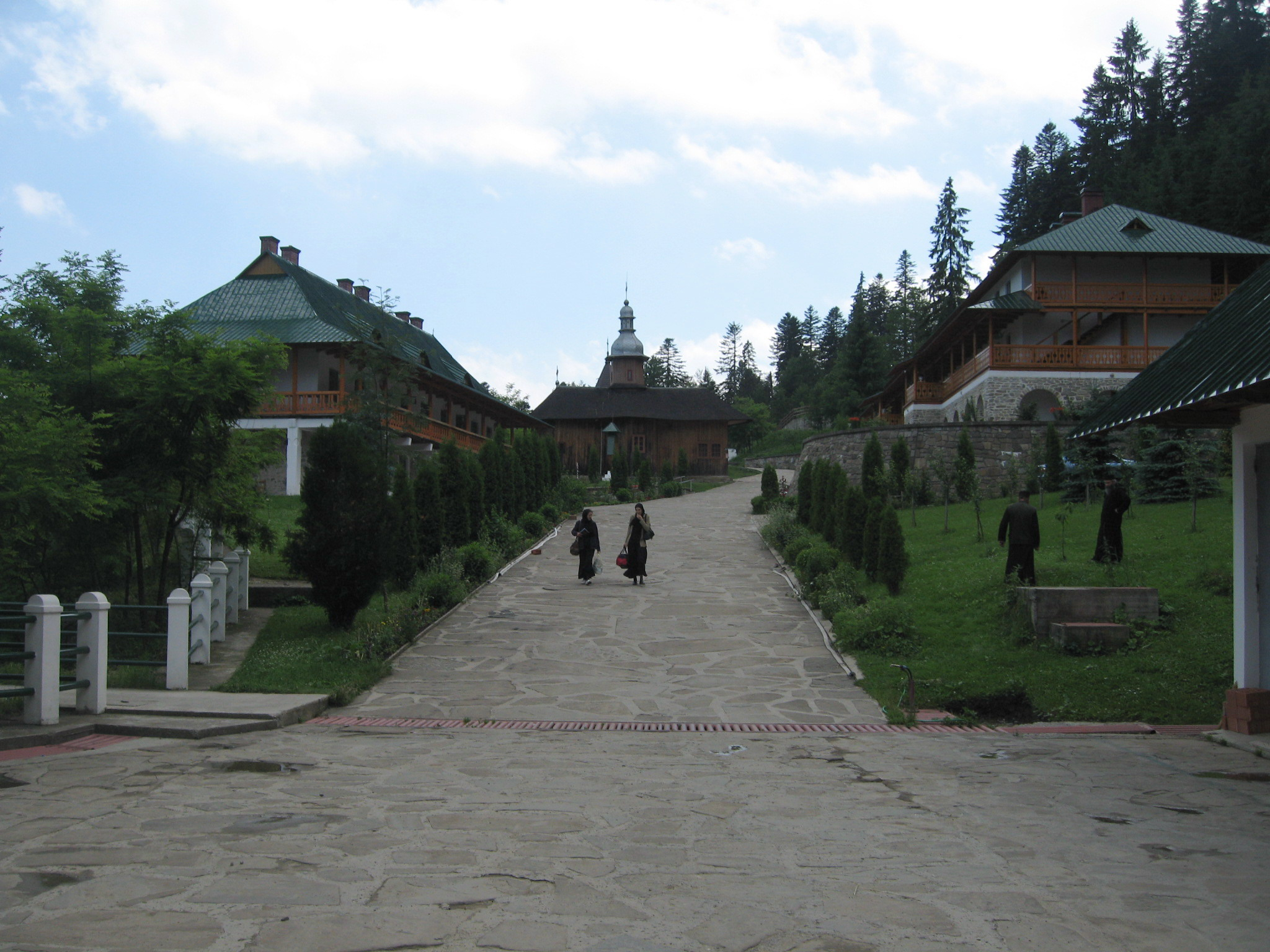 Mănăstirea Sihla